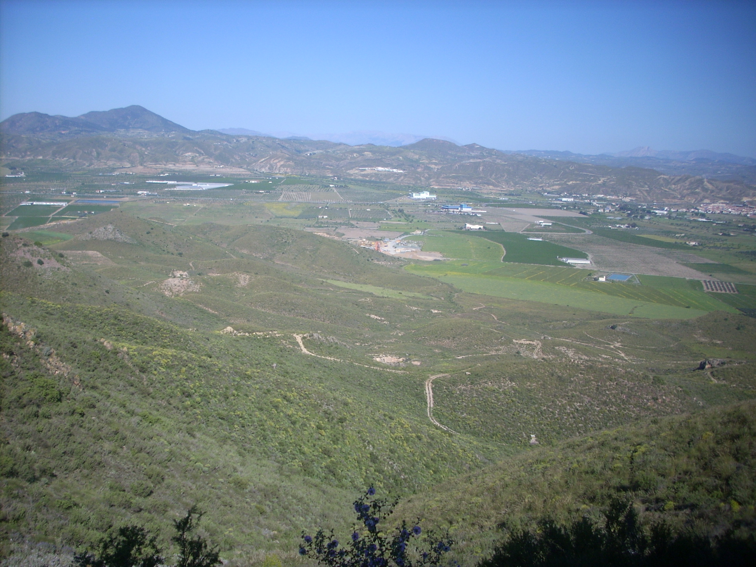 Vista de la Pedanía de Puerto Adentro desde Cueva del Rayo